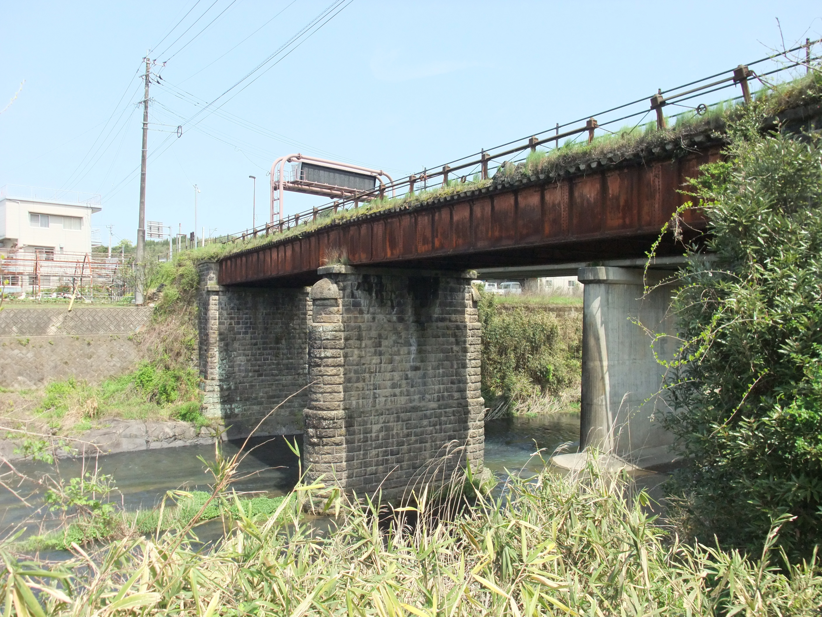 明治橋